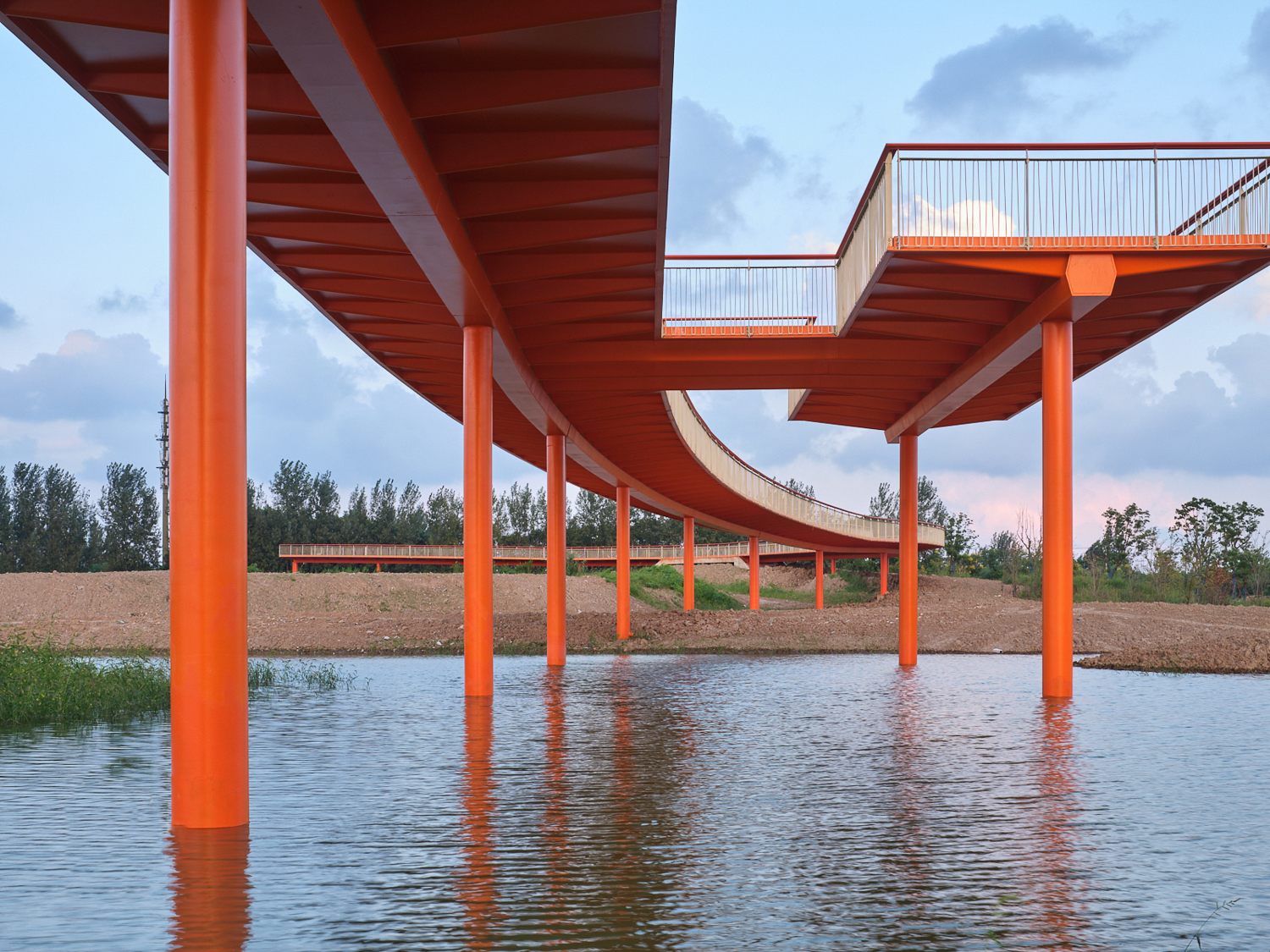 The Flying Spine. Eje Peatonal y Ciclista en Zhangjiabang Green Wedge (Shanghai, China). Foto por Zhang Yong (ZYArch Photographer)